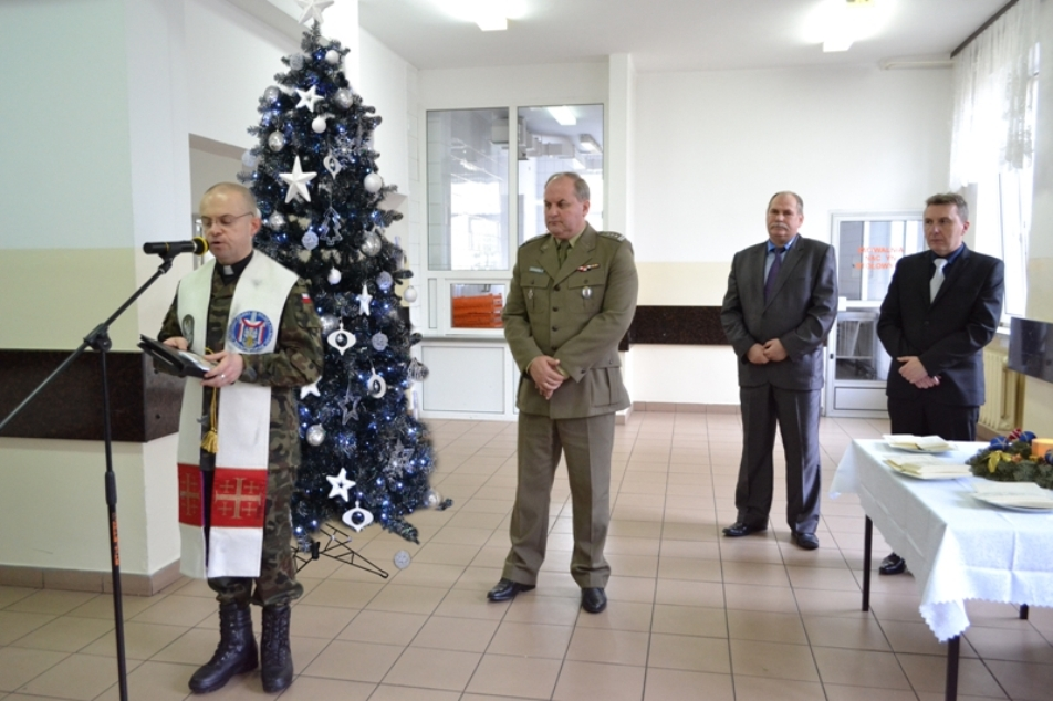 Spotkanie opłatkowe 2014 15 WOG w Stargardzie Szczecińskim